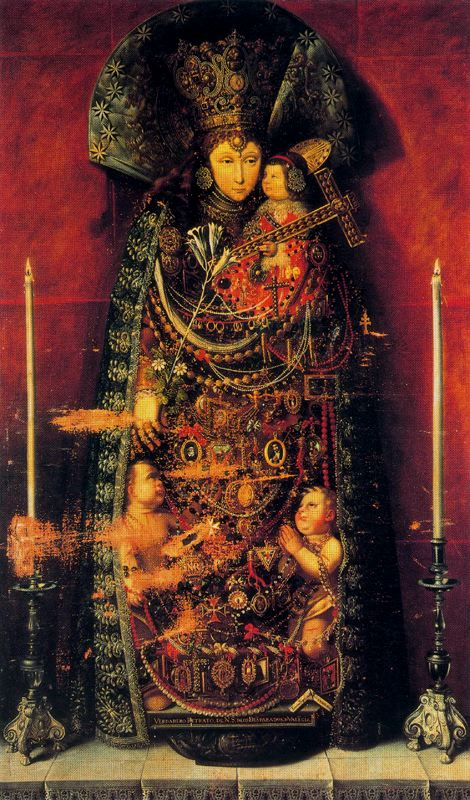 La obra muestra a la Virgen María llevando en sus brazos al Niño Jesús.